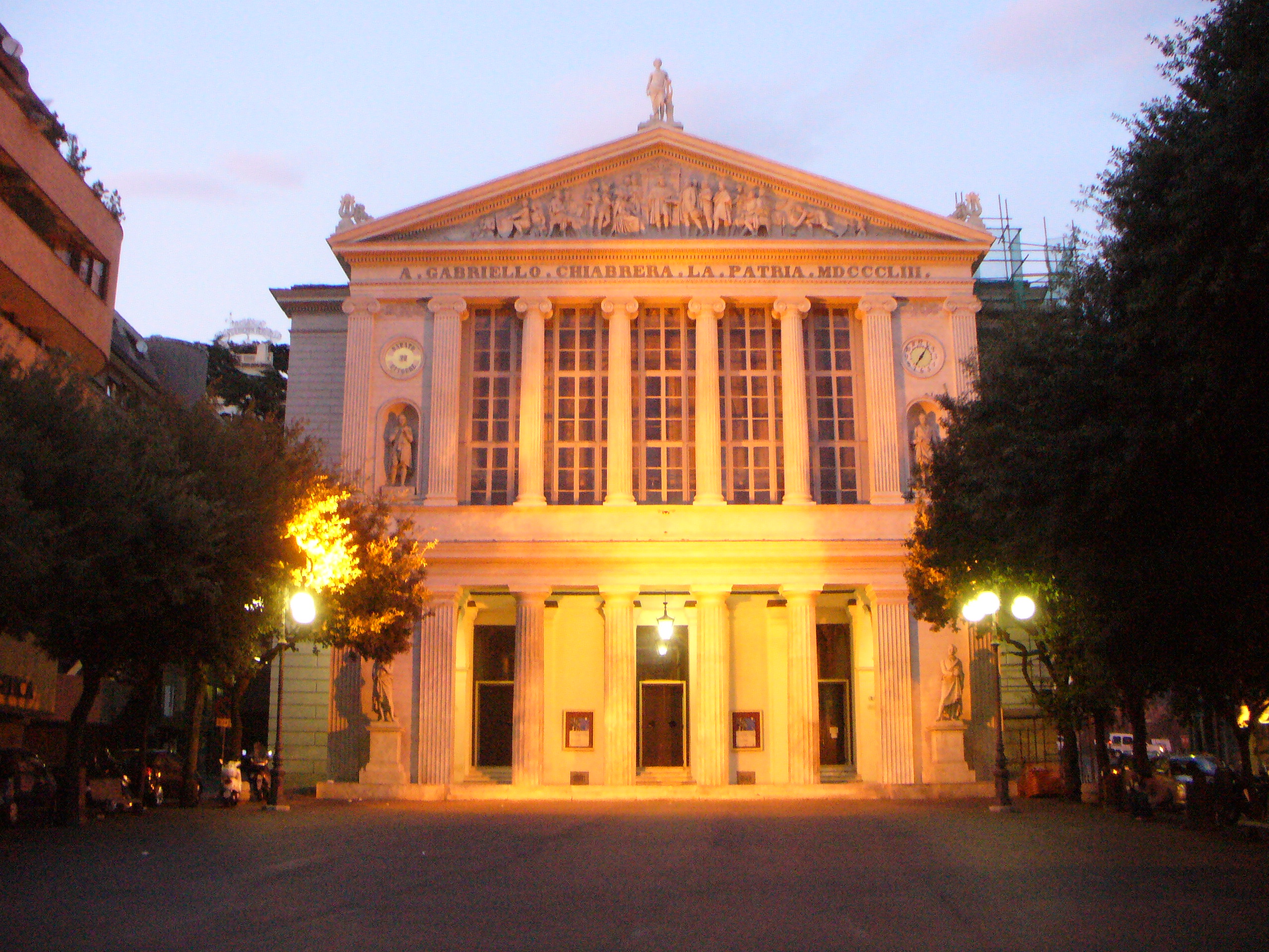 Il Teatro comunale di Savona Gabriello Chiabrera in serata